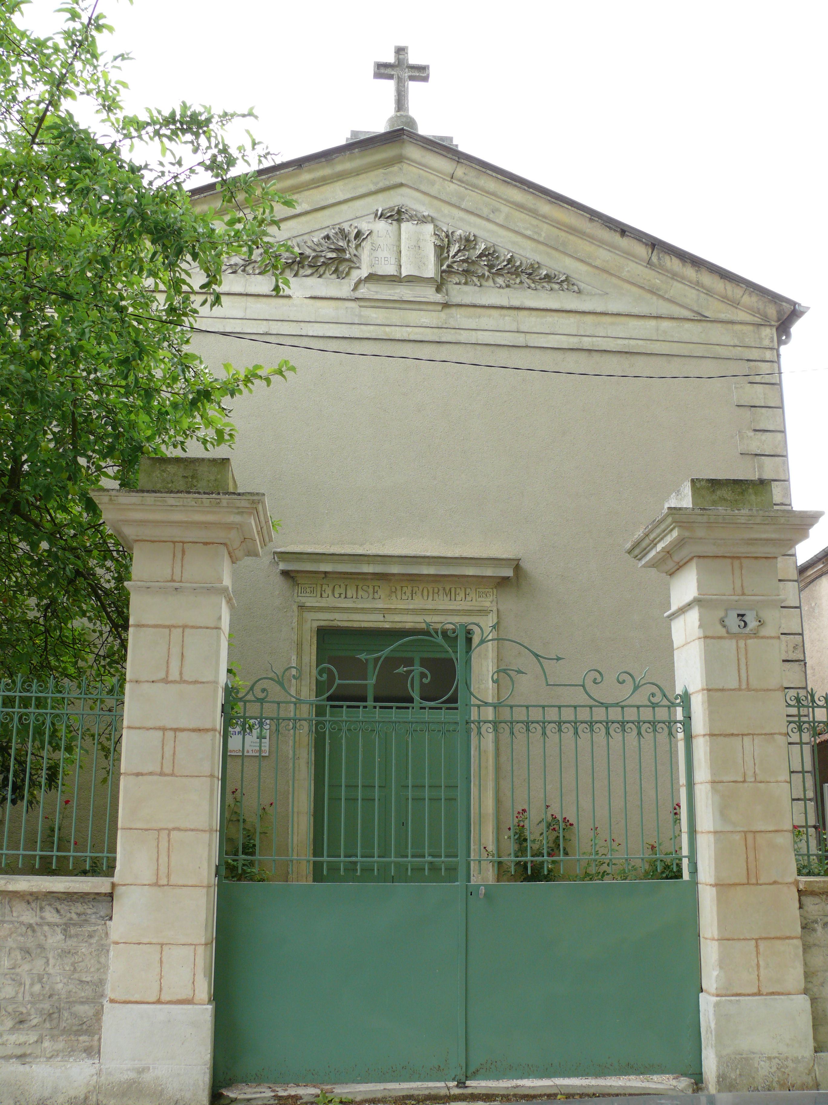 Bourges - Temple protestant